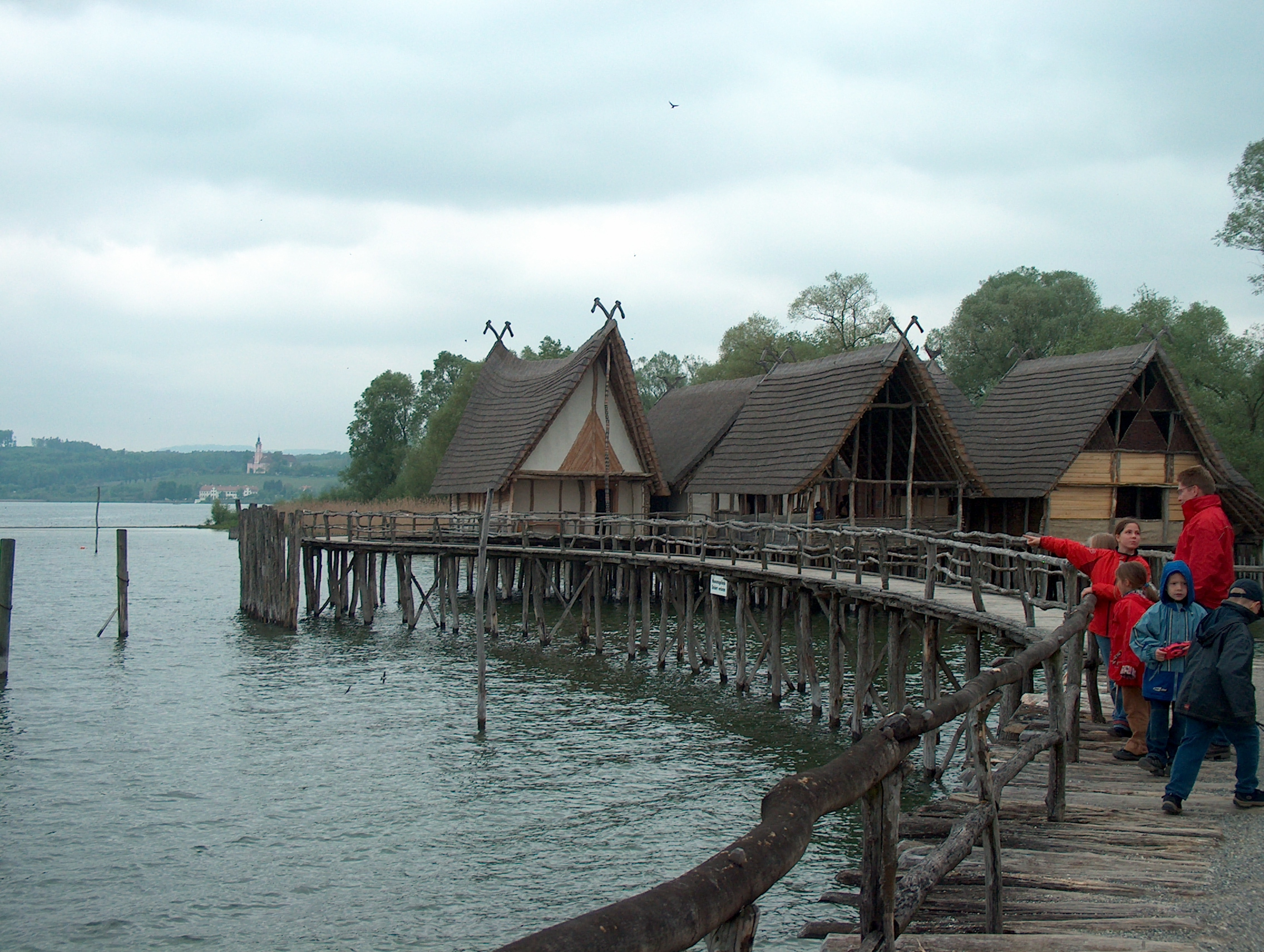 Pfahlbauten im Freilicht-Museum von Unteruhldingen.